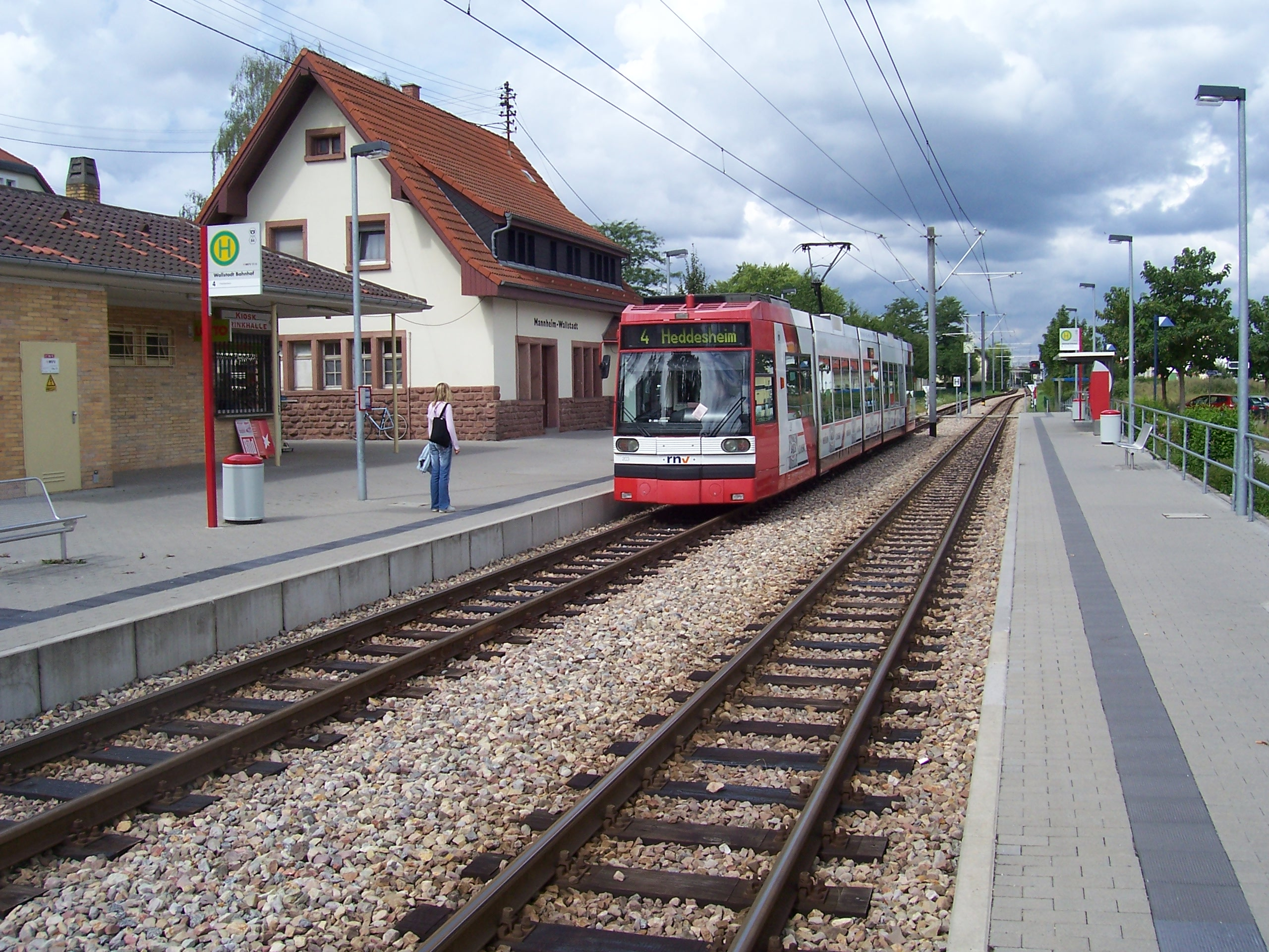 Die Stadtbahnhaltestelle in Mannheim-Wallstadt.